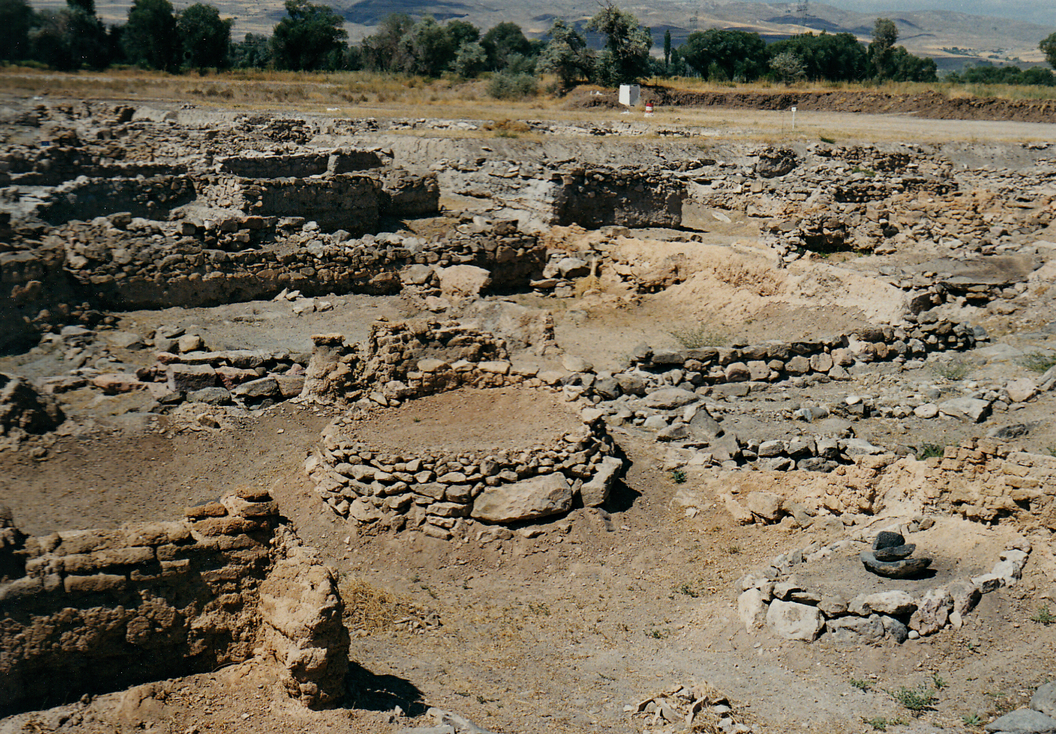 Kültepe-Kanes, bronzezeitlicher Fundort in der Zentraltürkei, Unterstadt-Karum